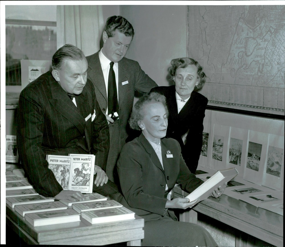 Bokhandlare Nils Sandberg, direktör Torsten Måtte Schmidt, bibliotekarie Elsa Olenius och författarinnan Astrid Lindgren i samband med en kurs på Medborgarhuset i Stockholm. Bilden publicerades i Svenska Dagbladet 1954-10-10 sid 9 (